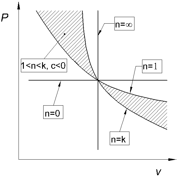 Esponenti di una politropica